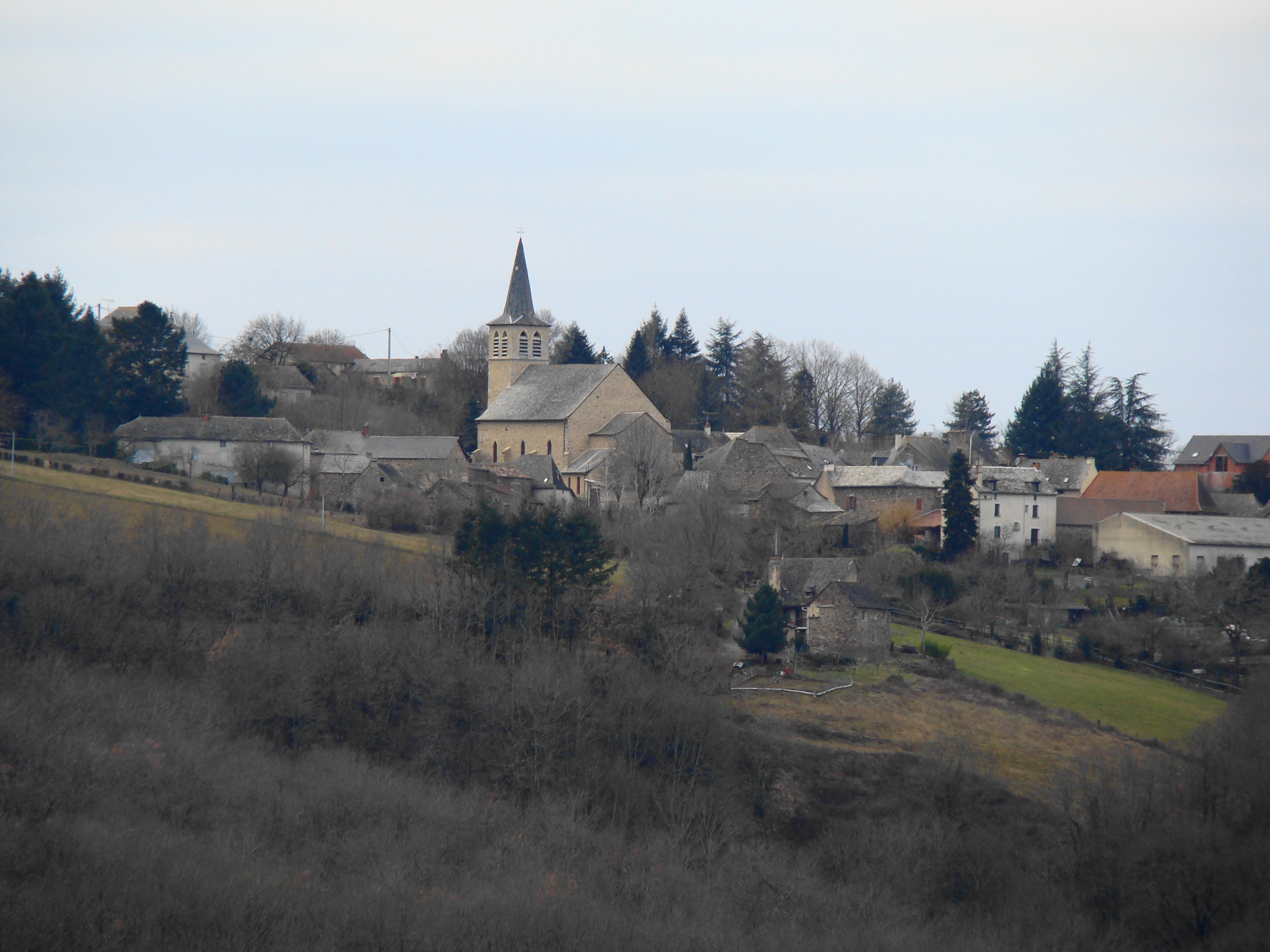 Le village de Saint-André-de-Najac vu de Lagarde-Viaur